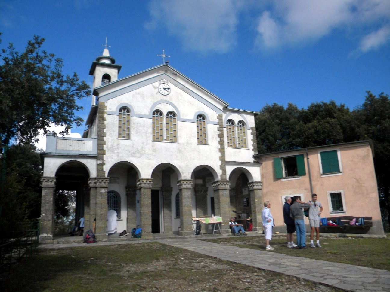 Facciata del santuario della Madonna di Caravaggio, Rapallo, Liguria, Italia